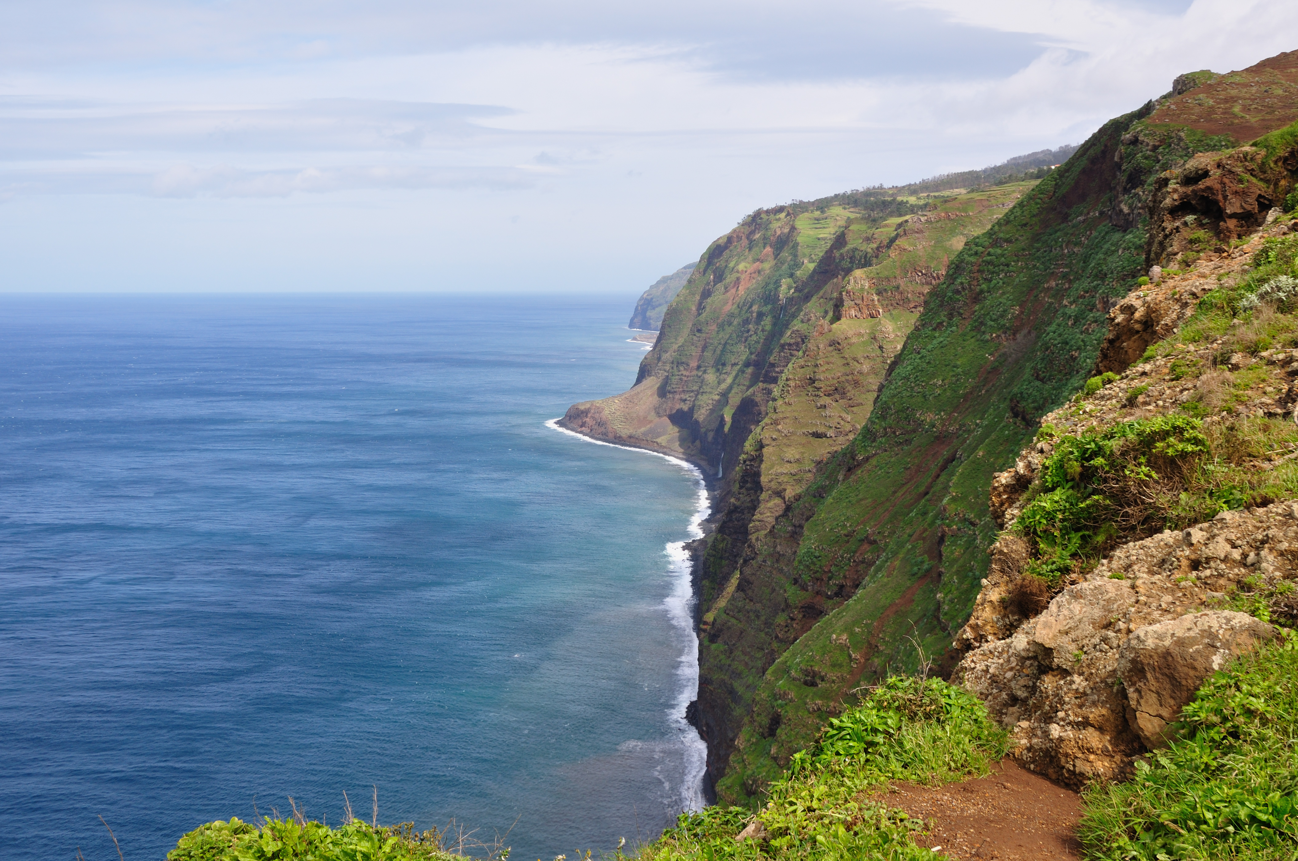 Portugal, Madeira, coast at Ponta do Pargo